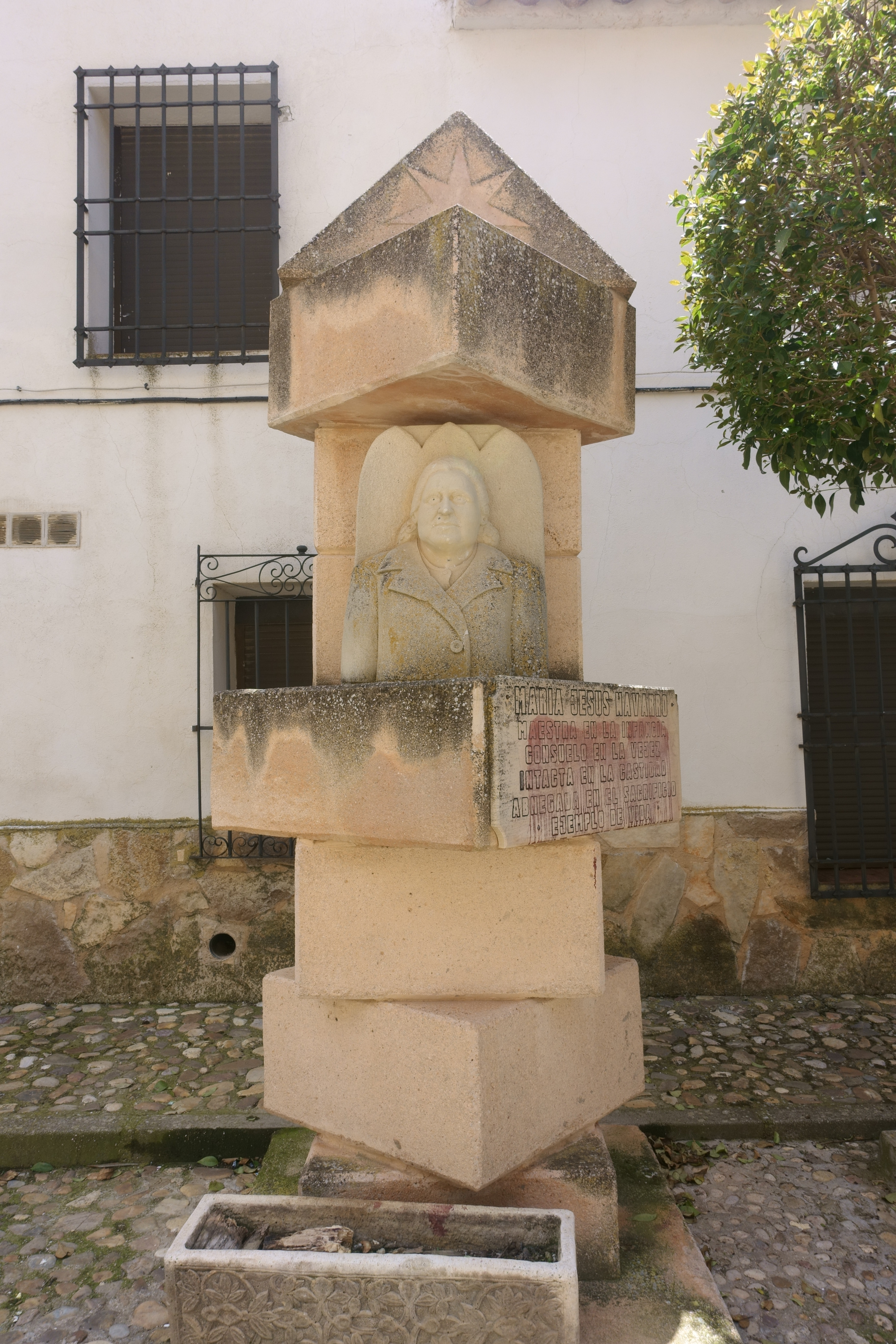 Monumento a María Jesús Navarro en Villamayor de Santiago (Cuenca, España).